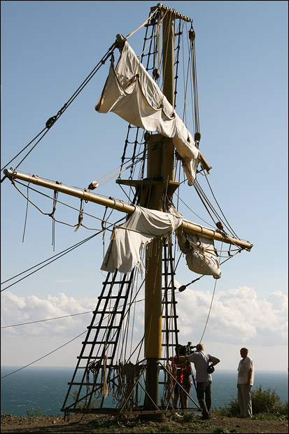 Мачта для комбинированных съемок на Ялтинской киностудии